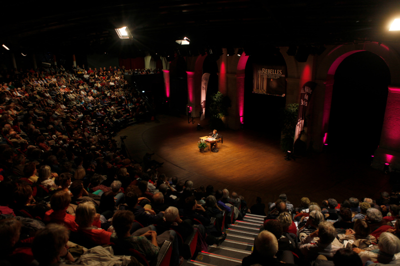 Conférence inaugurale des Rendez-vous de l'histoire